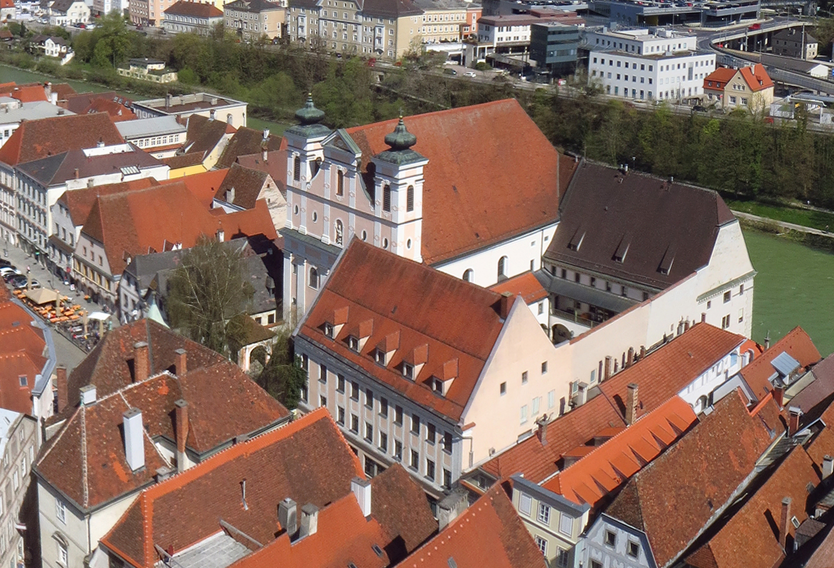 Blick vom Turm der Steyrer Stadtpfarrkirche auf die Marienkirche mit dem ehemaligen Klostergebäude.